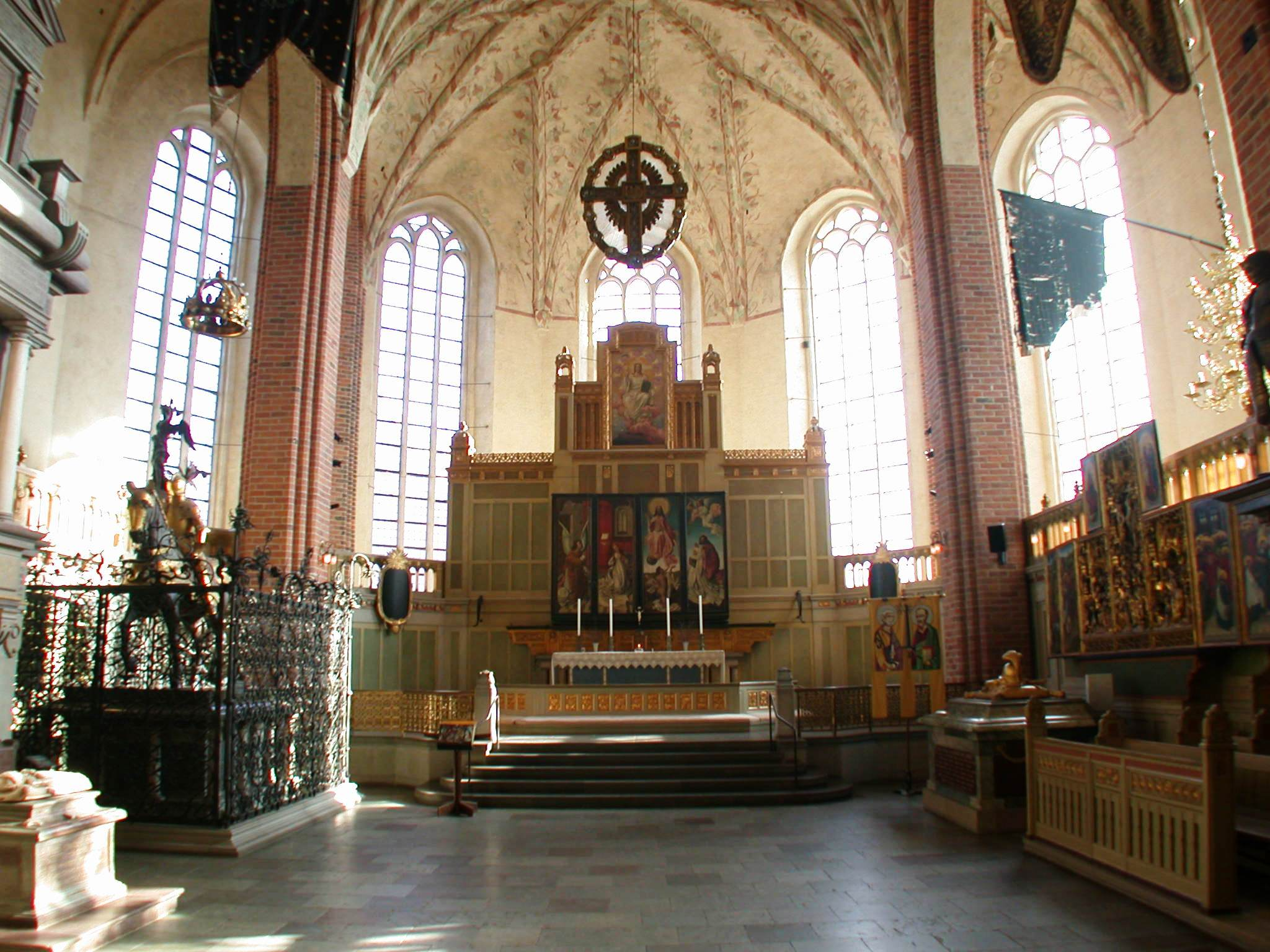 Strängnäs cathedral, Strängnäs, Sweden, Carl IX grave at left. Photo by Riggwelter, March 10, 2007.